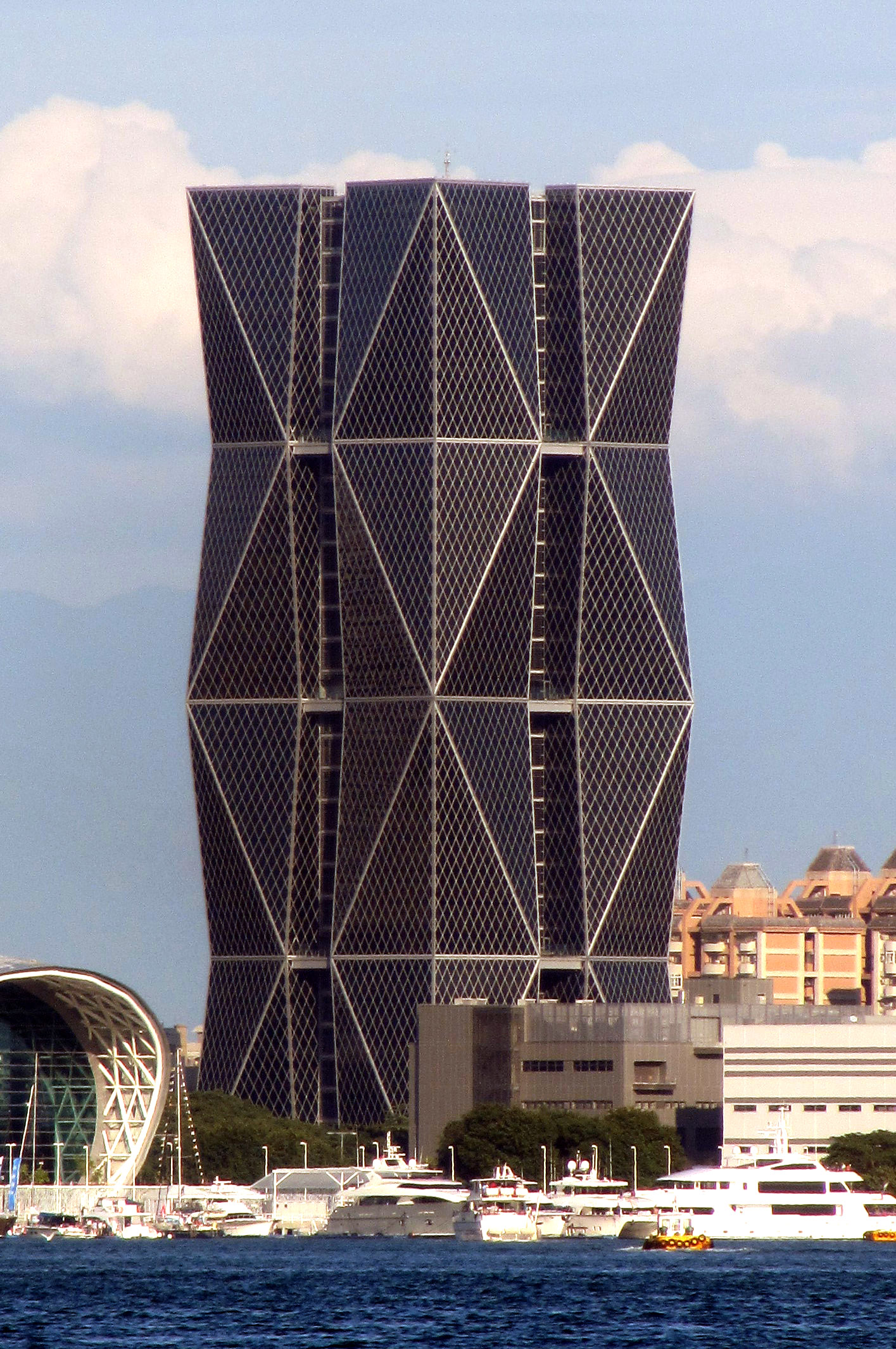 中國鋼鐵公司在高雄市成功一路上的總部大樓。